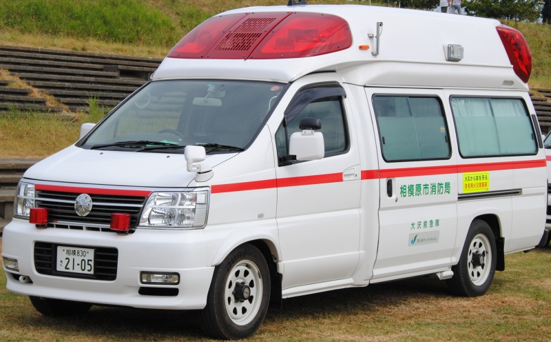 相模原市消防局の救急車